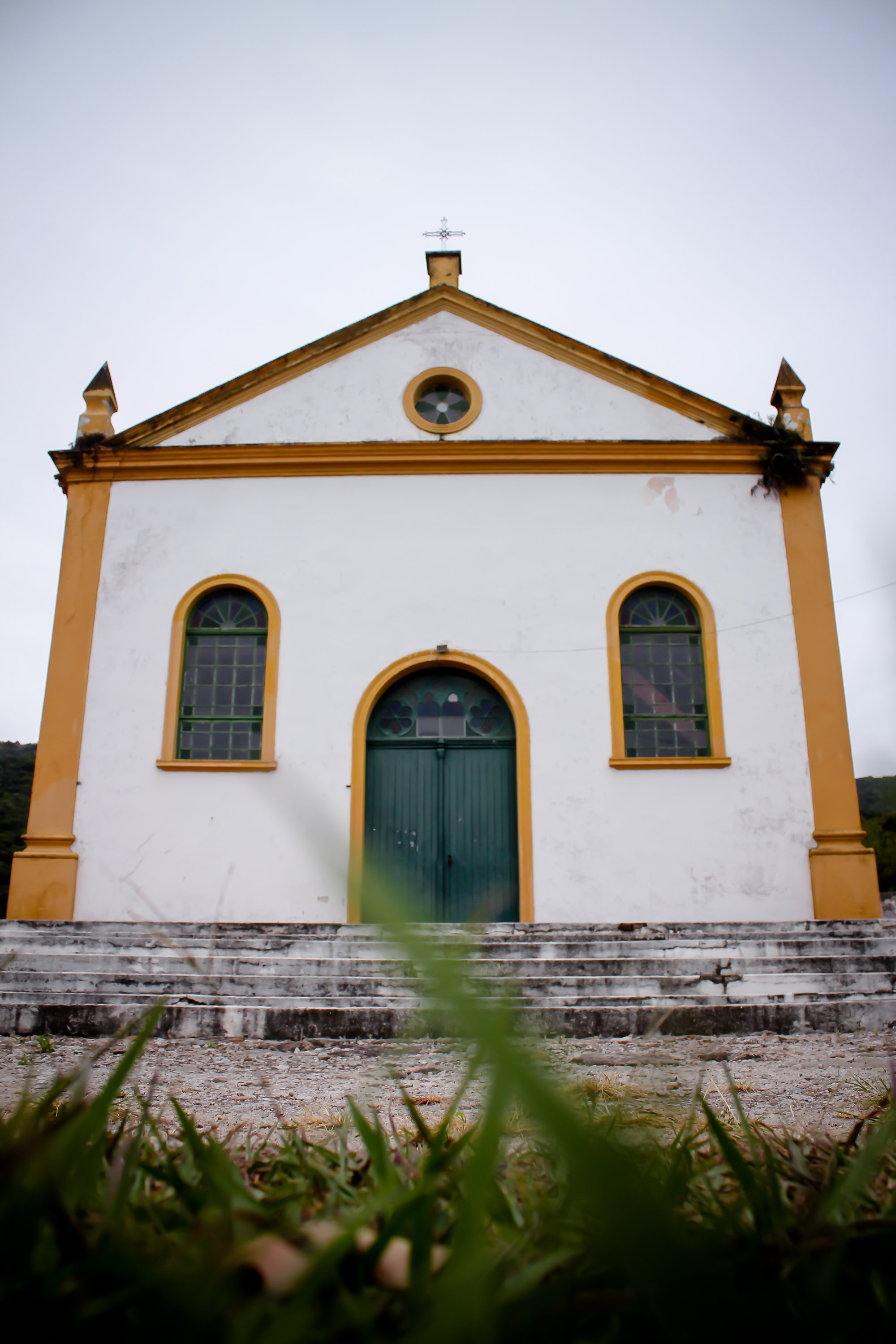 Vila de São Miguel: conjunto arquitetônico e paisagístico: Igreja, Aqueduto, Carioca